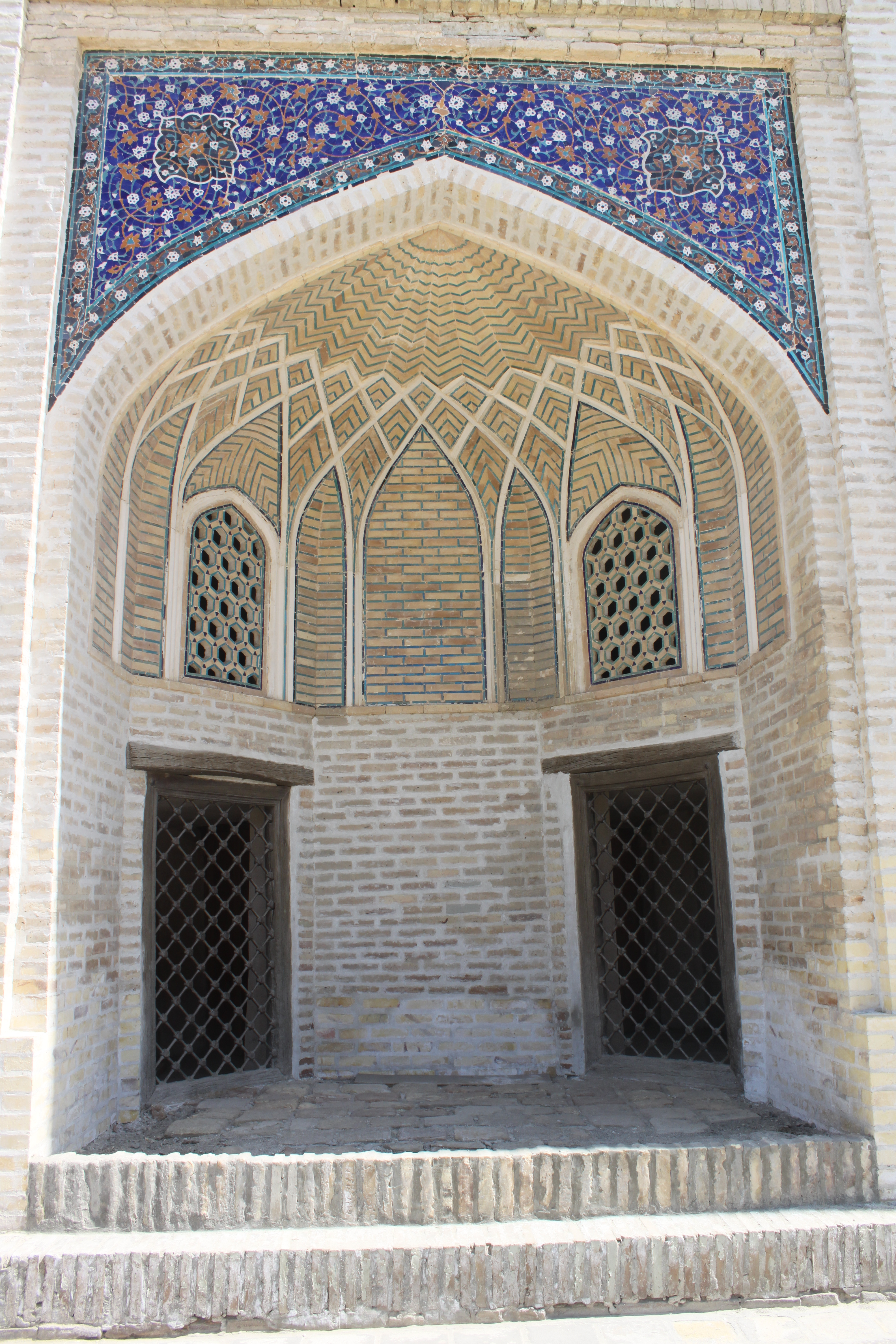 Accès extérieur à des cellules de la madrasa mir-i-arab